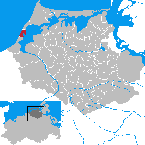 Wustrow in Mecklenburg-Vorpommern - District Nordvorpommern